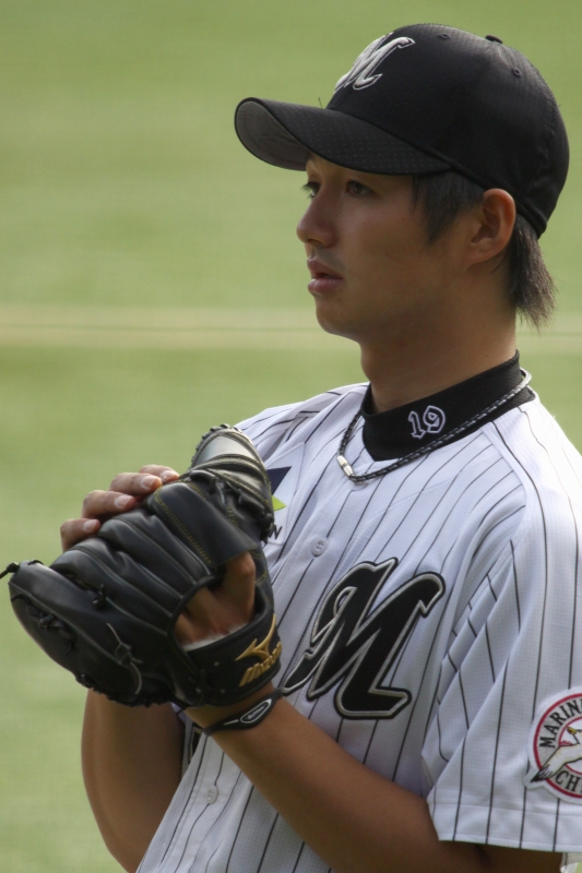 日本プロ野球 千葉ロッテマリーンズ 唐川侑己 投手